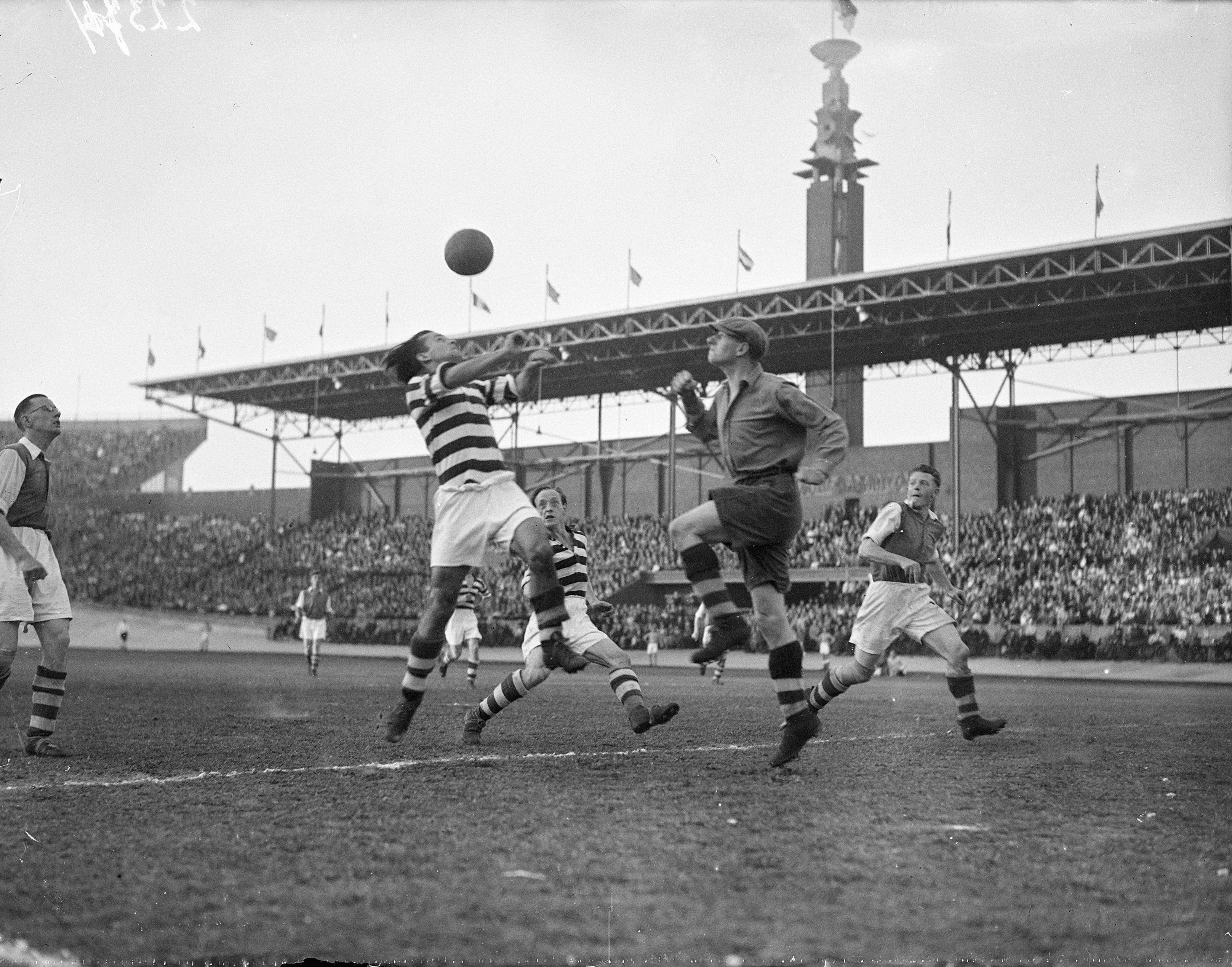 Collectie / Archief : Fotocollectie Anefo Reportage / Serie : [ onbekend ] Beschrijving : Blauw Wit tegen Ajax. 1-2. Ajax kampioen van Nederland. Luchtduel Datum : 25 juni 1947 Locatie : Amsterdam Trefwoorden : sport, voetbal Instellingsnaam : Blauw Wit Fotograaf : Noske, J.D. / Anefo Auteursrechthebbende : Nationaal Archief Materiaalsoort : Glasnegatief Nummer archiefinventaris : bekijk toegang 2.24.01.09 Bestanddeelnummer : 902-2374